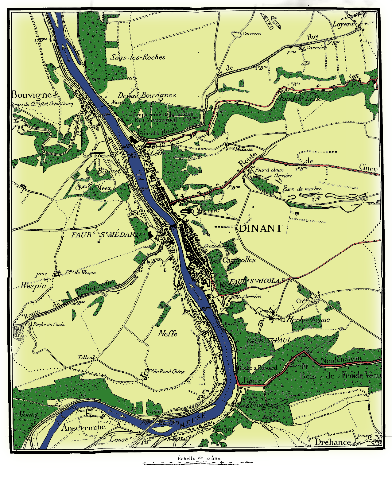 Carte ancienne représentant Dinant en 1914 publiée en 1917